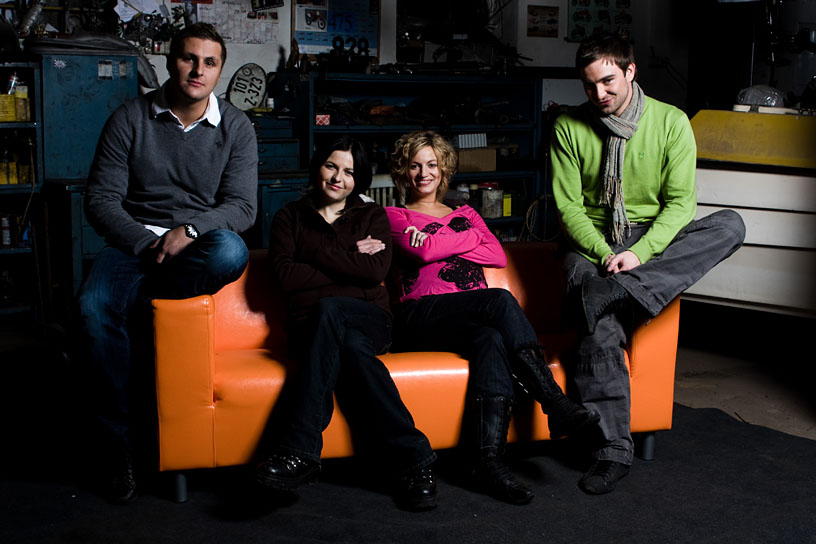 Moderátoři televizního pořadu Auto Moto Styl pohromadě